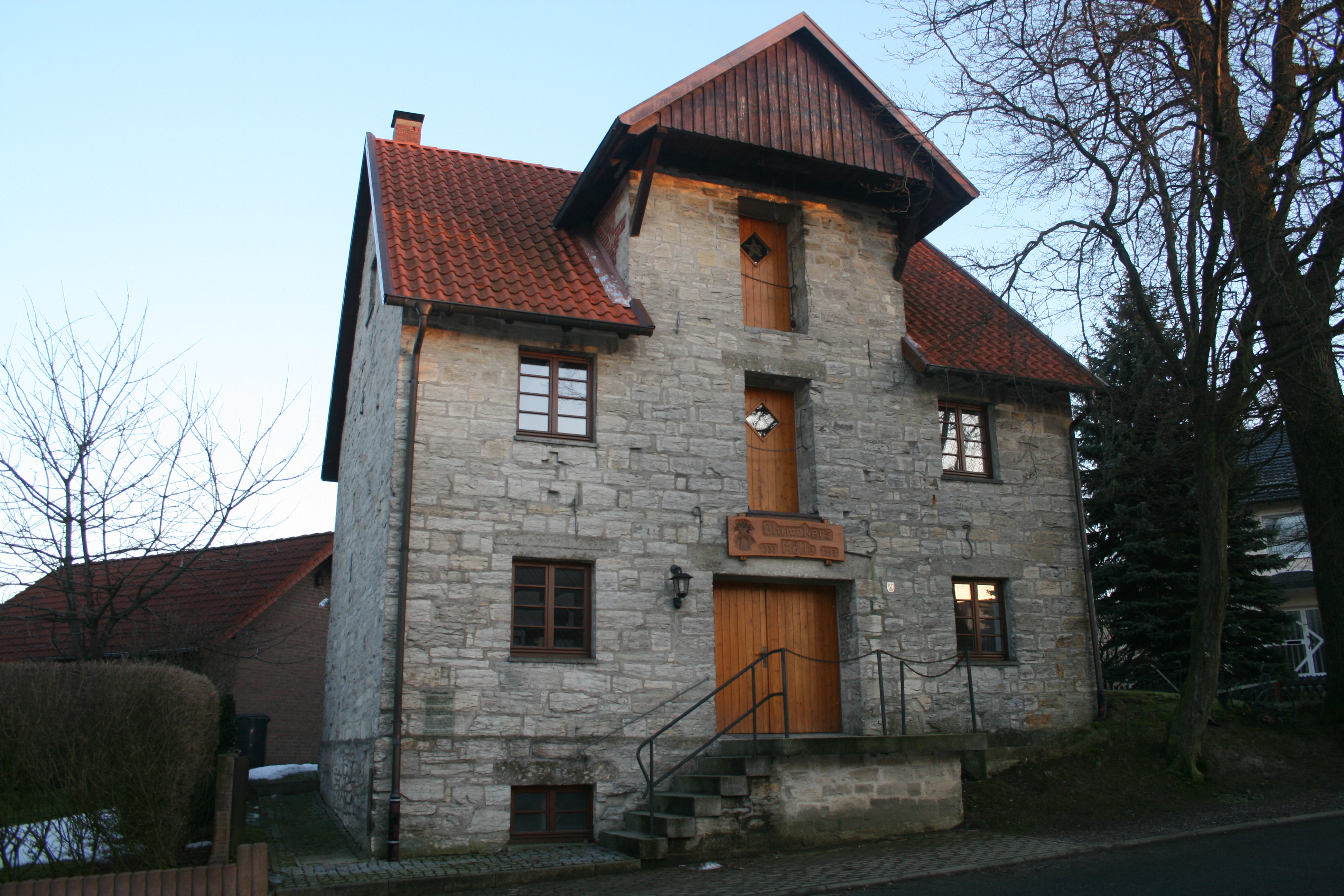 Bild der Ohrmackers-Mühle in Haaren